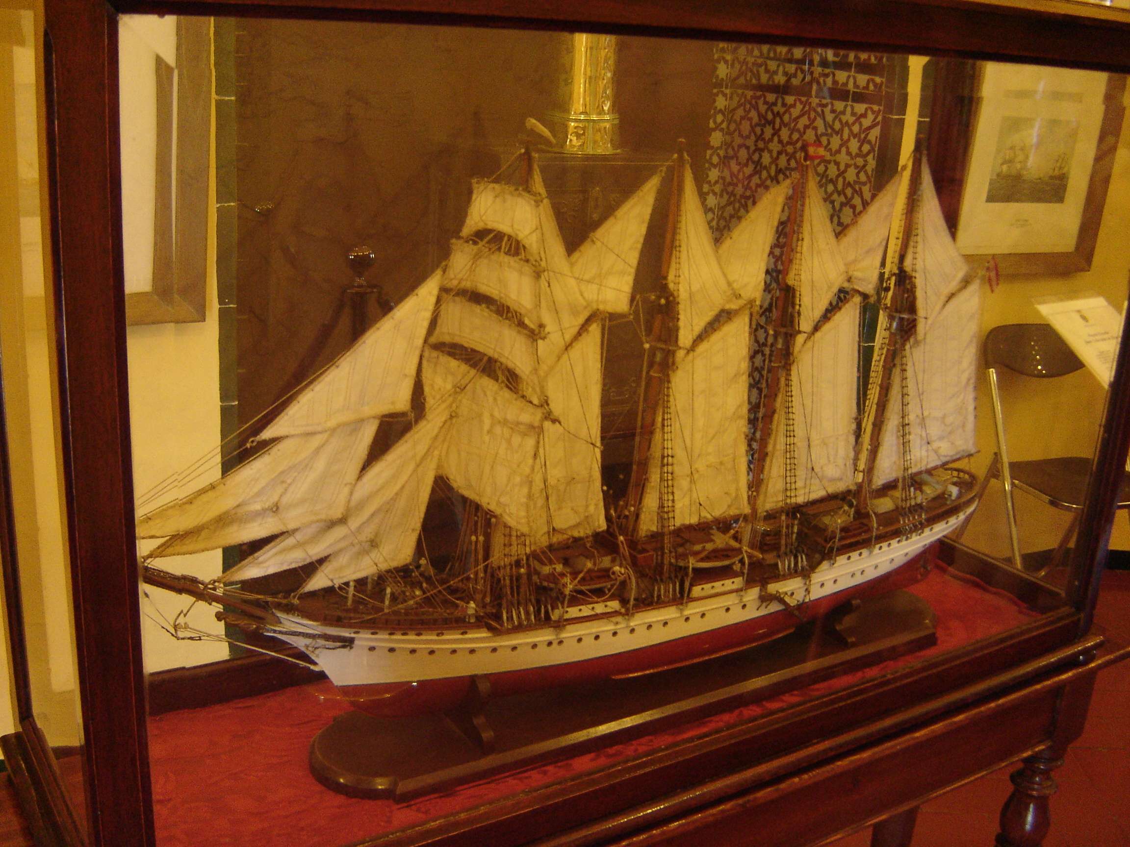 Juan Sebastián Elcano (Museo Naval, Sevilla, España).